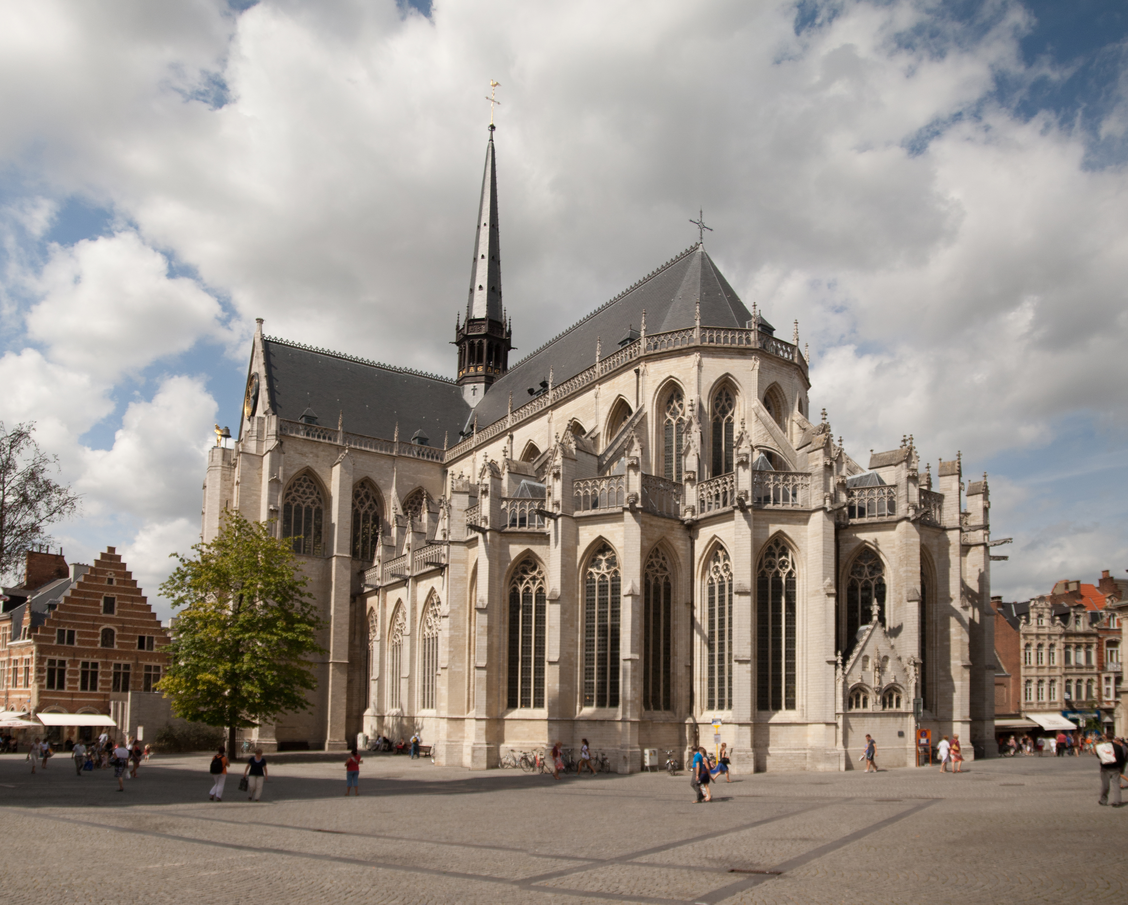 Pieterskerk, Leuven